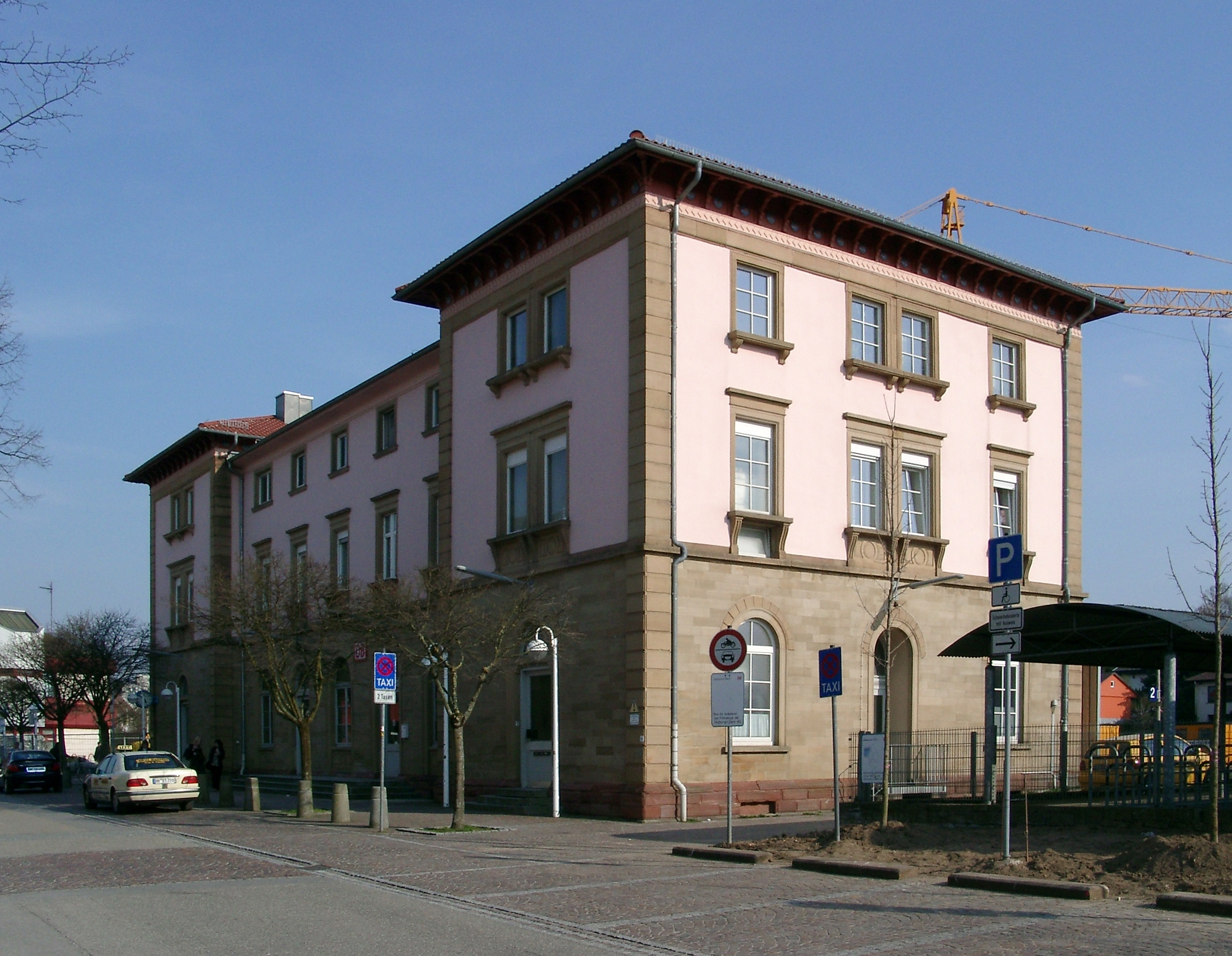 Bad Rappenau, Bahnhof